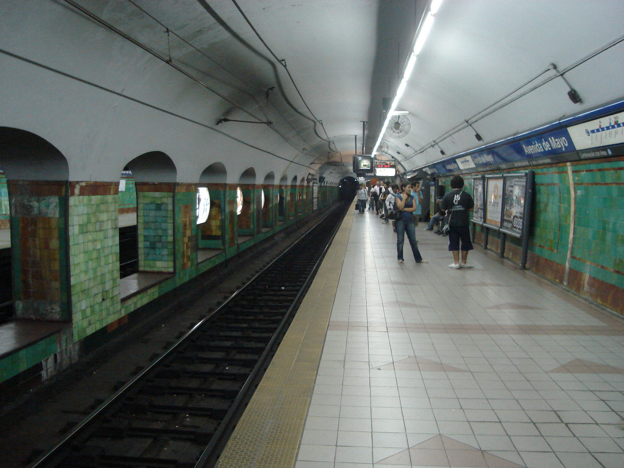 Vista del andén a Retiro de la estación Avenida de Mayo de la línea C del Subte de Buenos Aires.